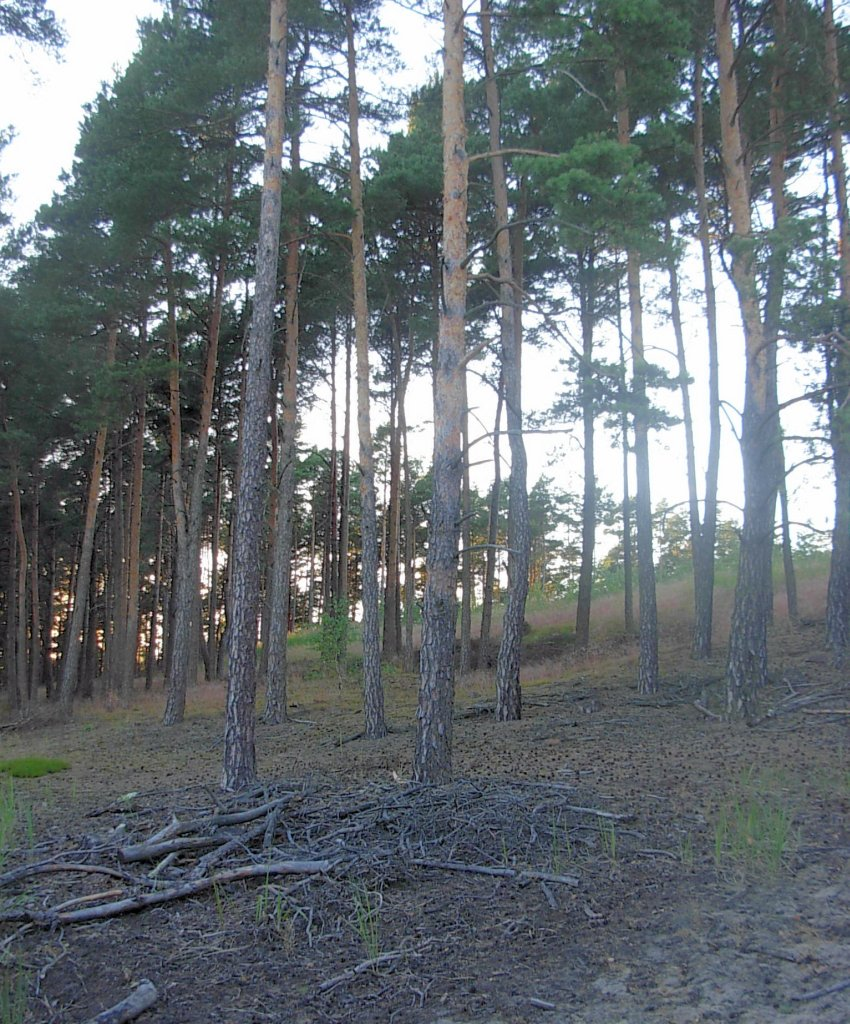 Puszcza Bydgoska - bór suchy